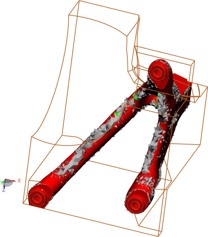 Designspace, Hull, smoothed hull (VisPER)